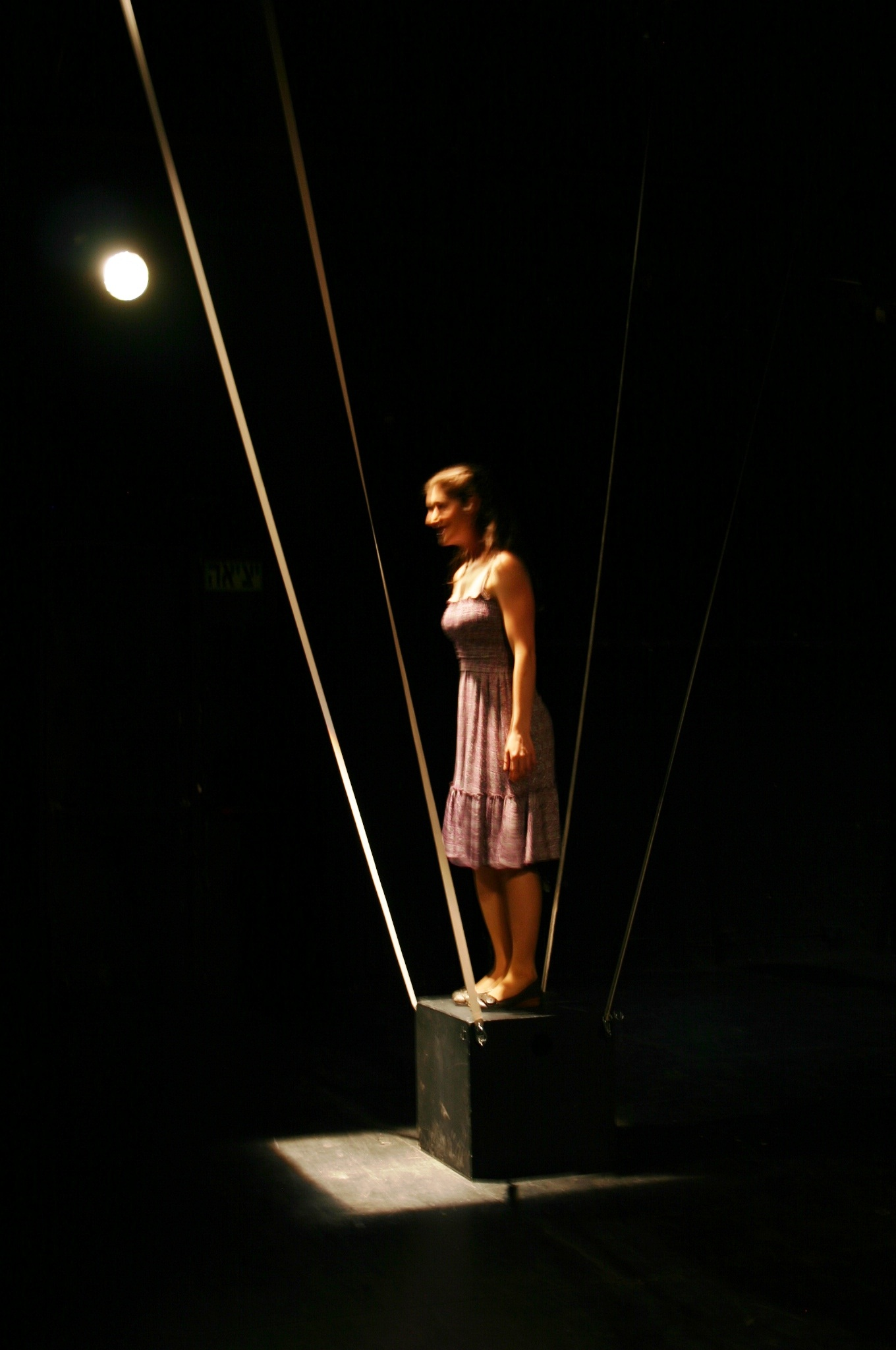 צוצי מאת ובבימויו של עודד ליפשיץ